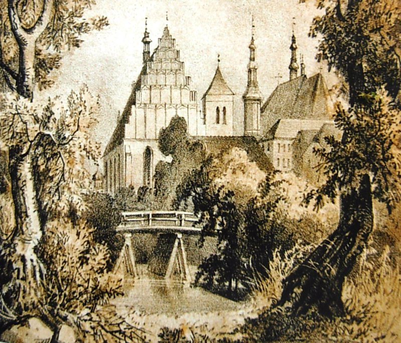 Most magazynowy w Bydgoszczy na rycinie Juliusa Gretha w 1853 r.